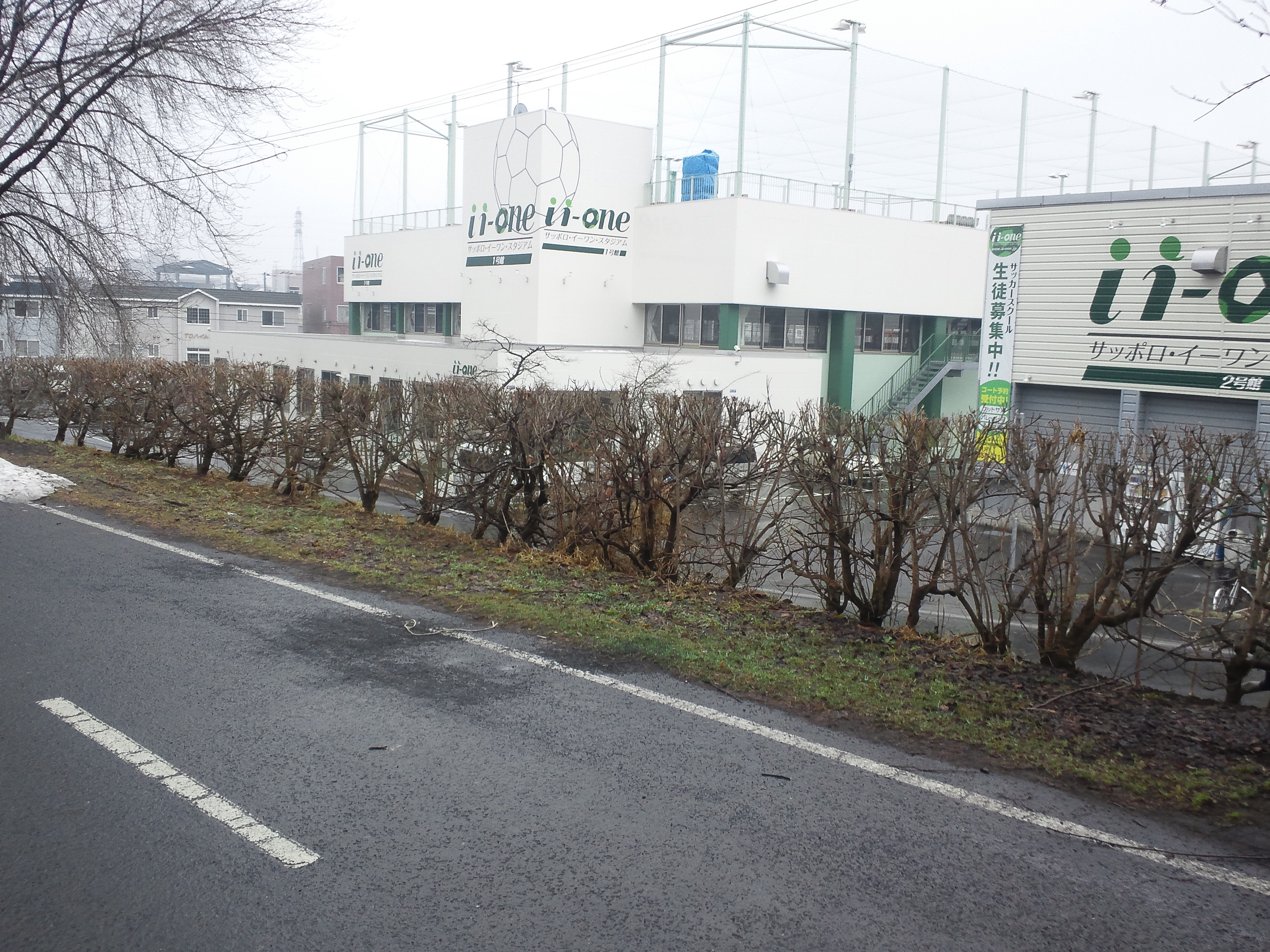 札幌市白石区に所在するフットサル専用室内グラウンド（2012/04撮影）